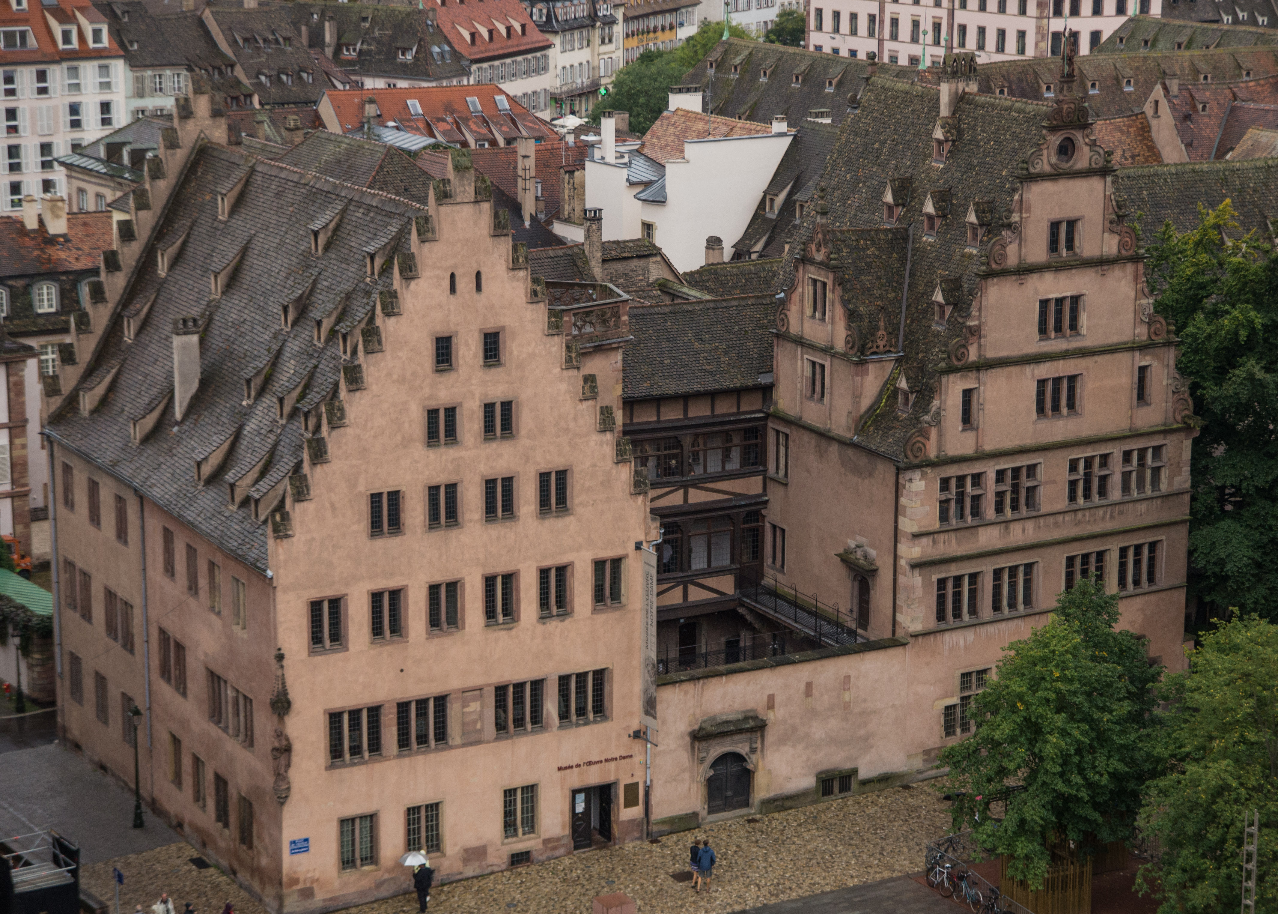 Musée de l'Œuvre Notre-Dame- maison- façades, toitures, escalier intérieur .